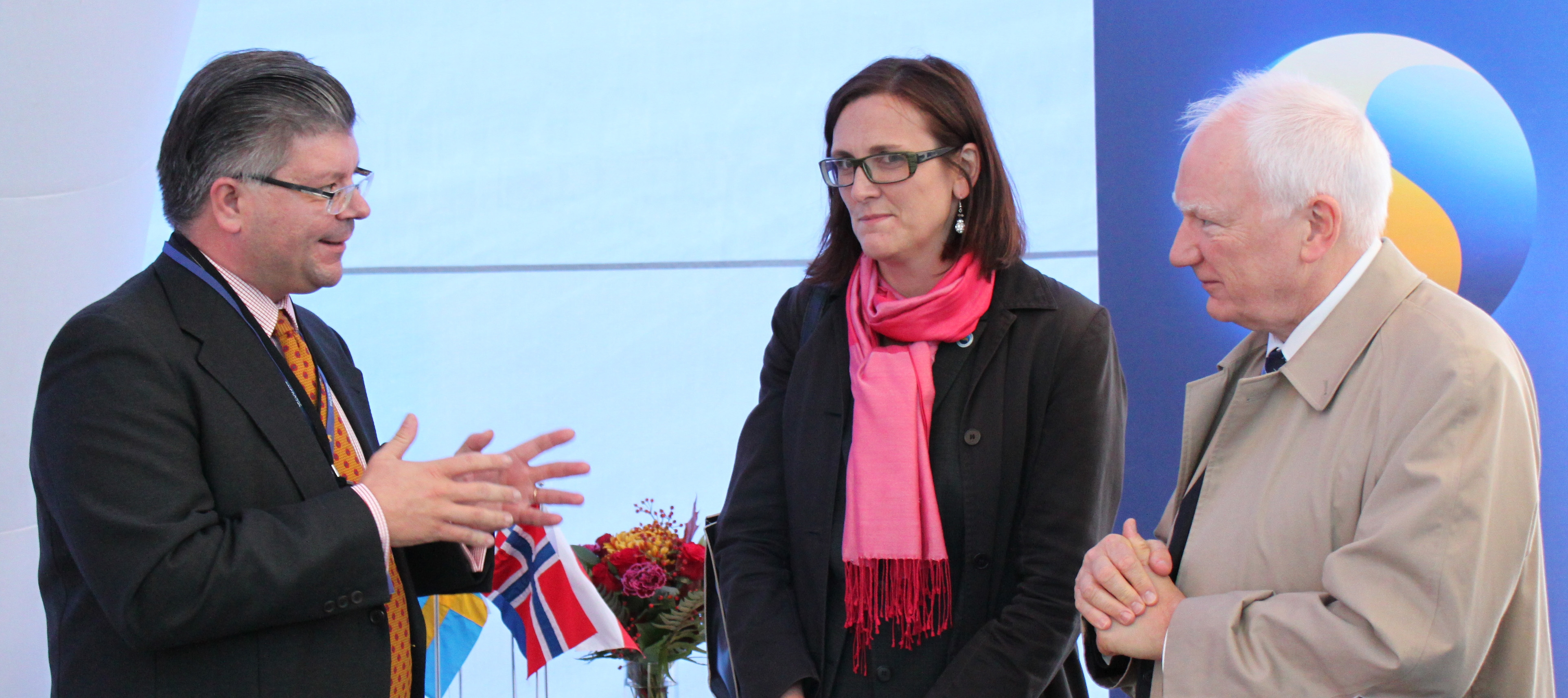 Hans Wallmark, EU-minister Cecilia Malmström och Europeiska investeringsbankens ordförande Philippe Maystadt